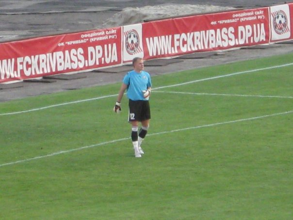 Евгений Анатольевич Боровик